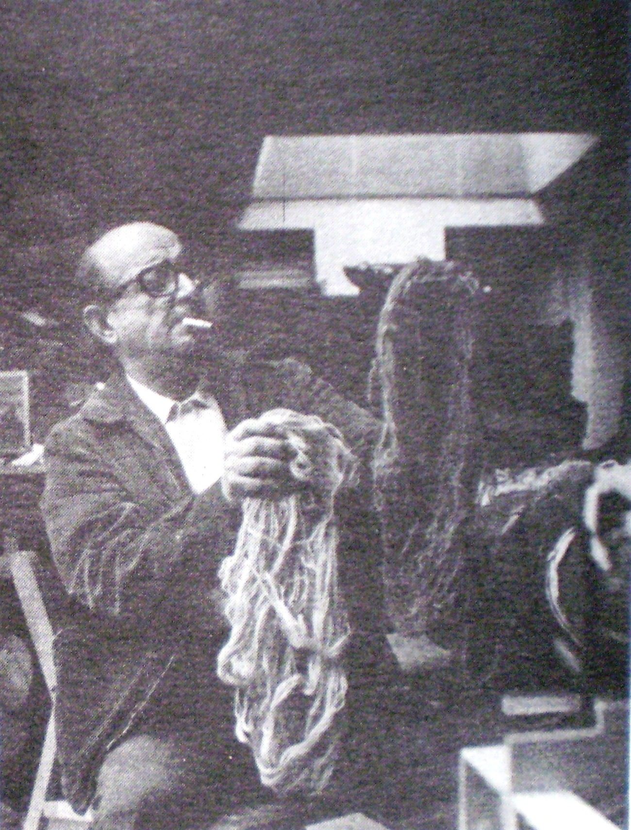 Antonio Berni en su taller